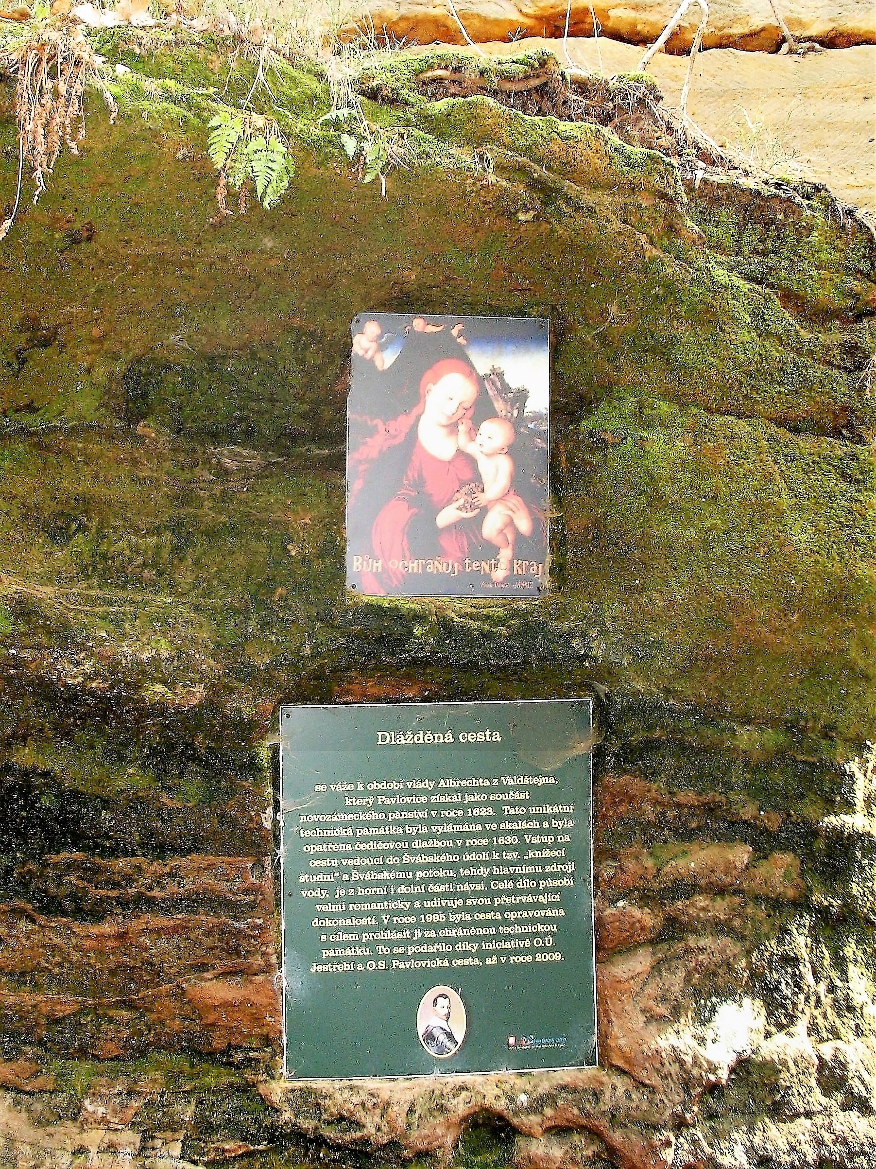 Barokní dlážděná cesta ze 17. století v Pavlovicích (Jestřebí, okres Česká Lípa). Cesta spolu s trojicí skalních výklenků a tzv. Knížecí studánkou v údolí Švábského potoka v Popelově je zapsána na seznamu nemovitých kulturních památek ČR